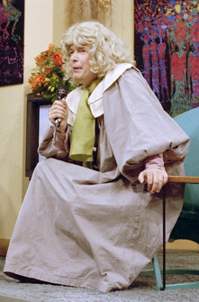 Margreet Dolman in Tineke